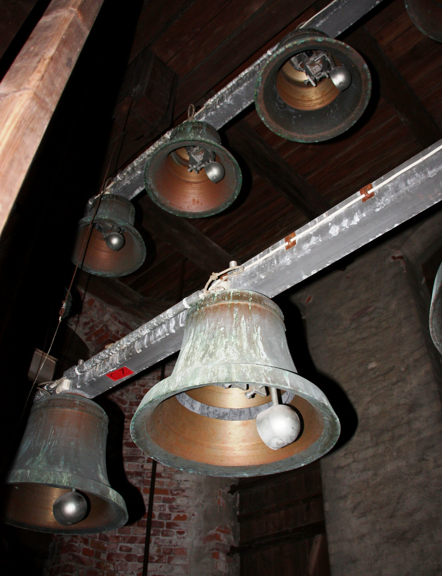 Kirkeklokkene i Trefoldighetskirken i Arendal